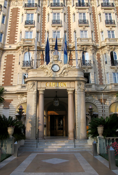 Hôtel Carlton, Cannes, PACA, France